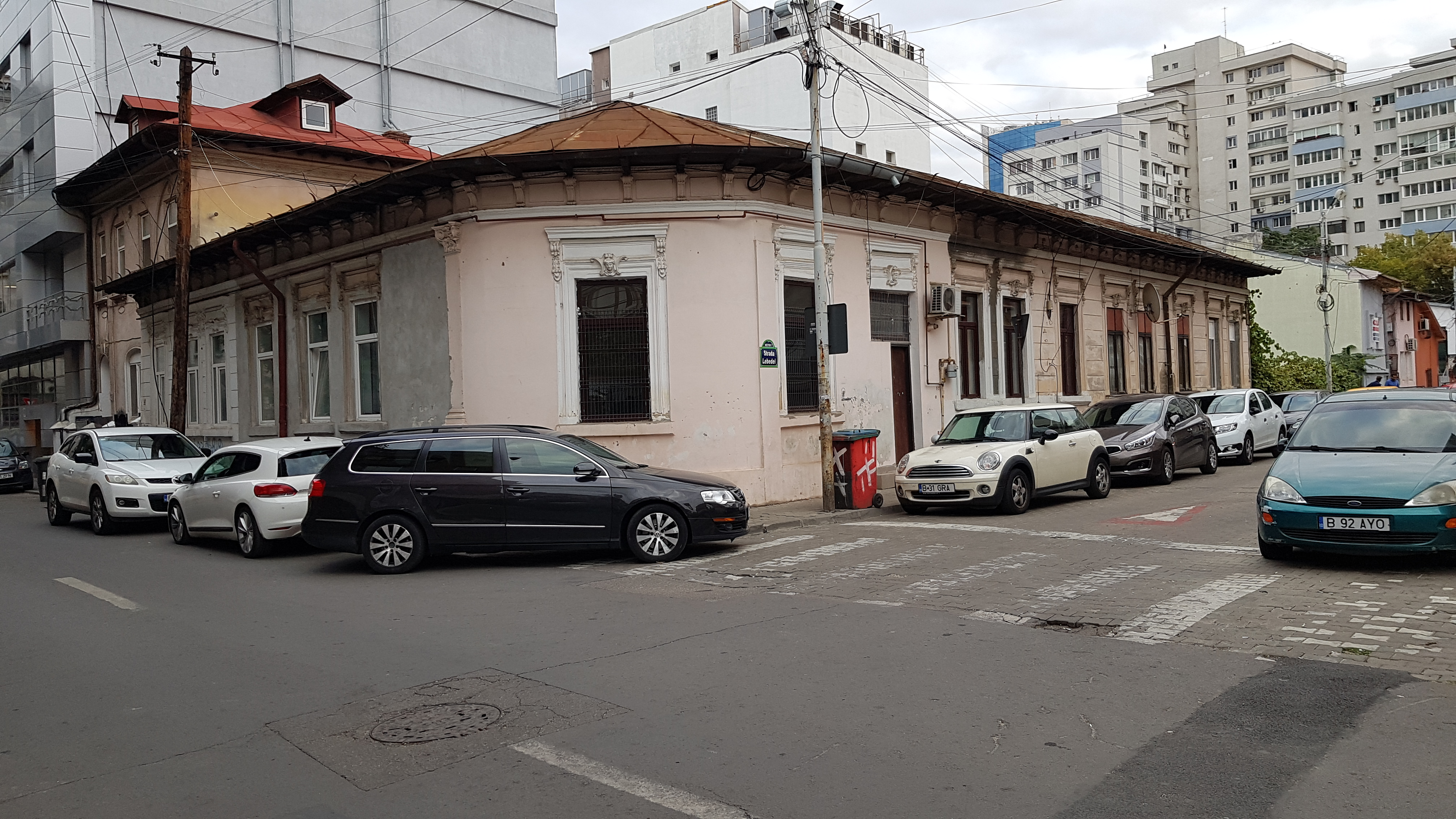 Casă, monument istoric